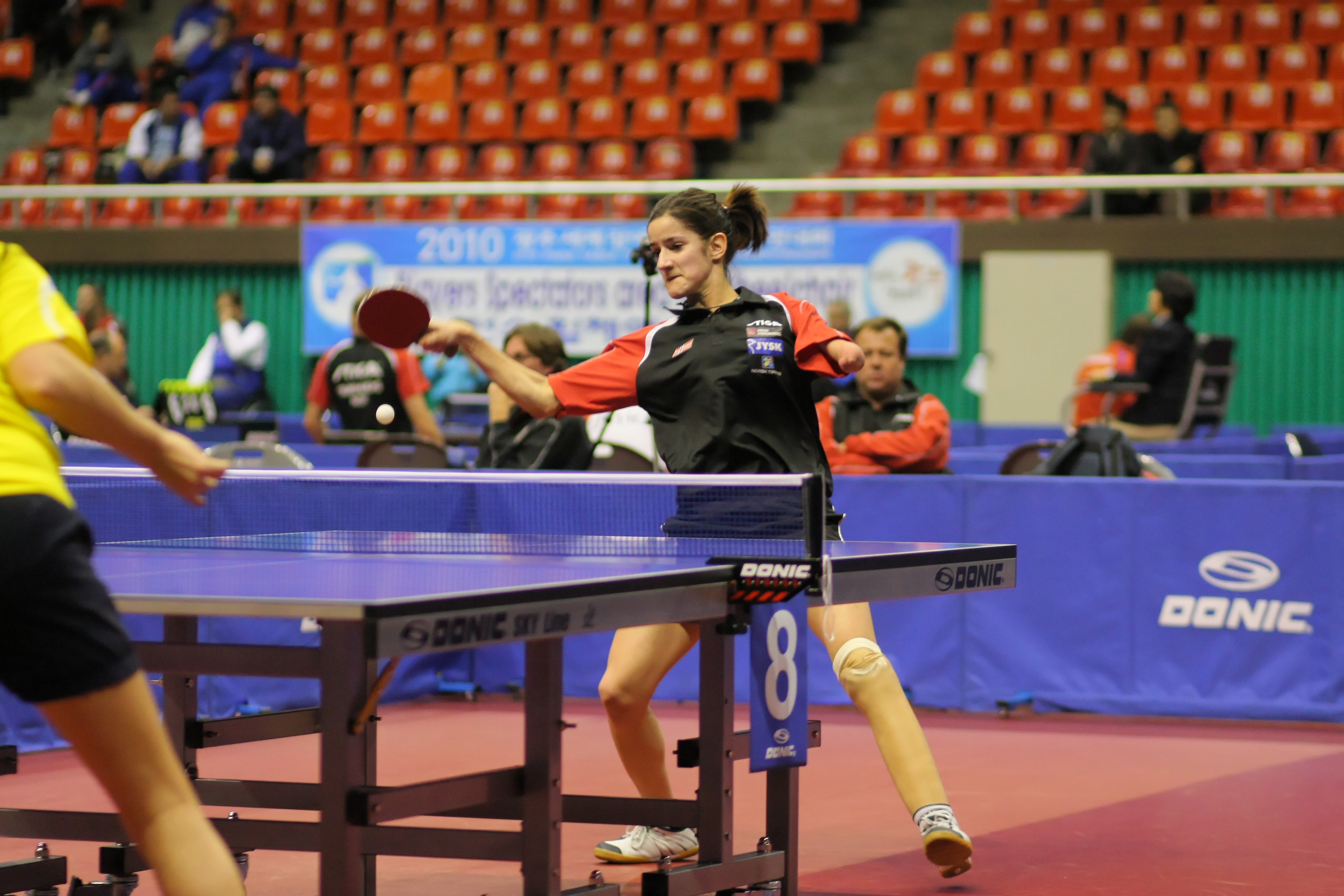 Aida Dahlen (NOR)